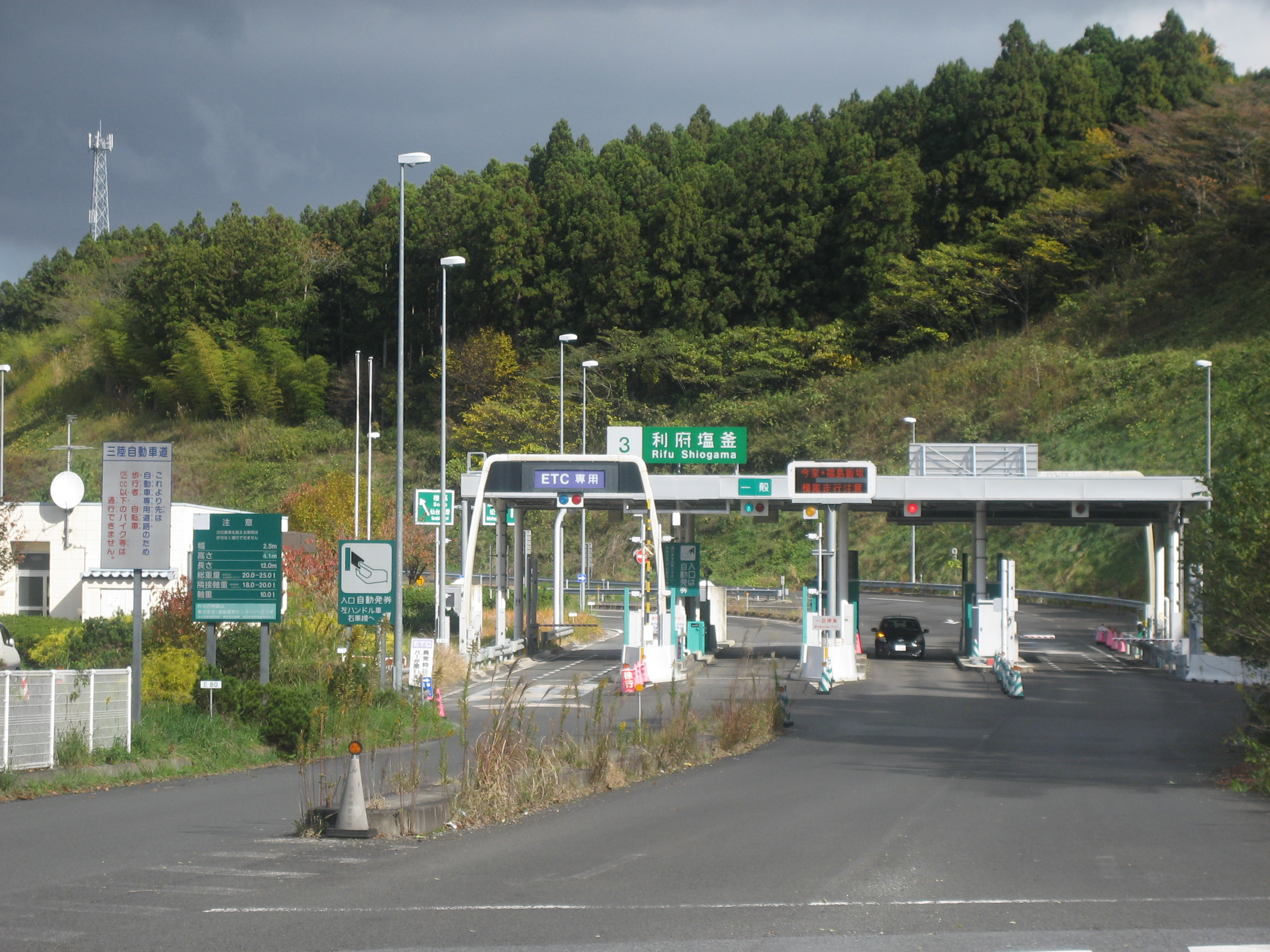 三陸自動車道利府塩釜インターチェンジ料金所